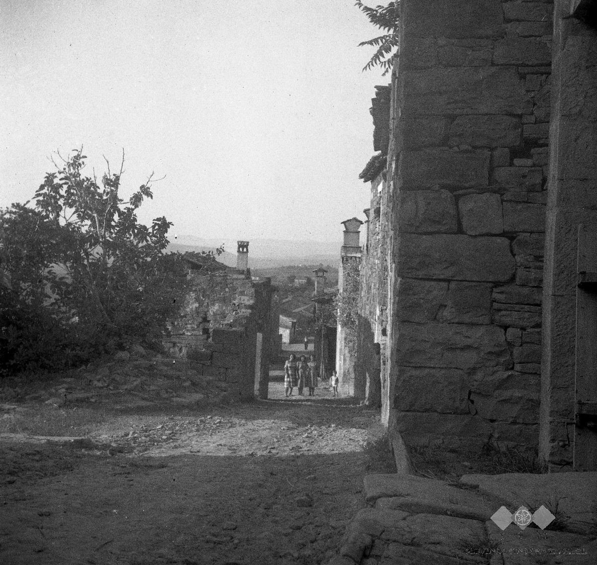 Manžan- ulice.